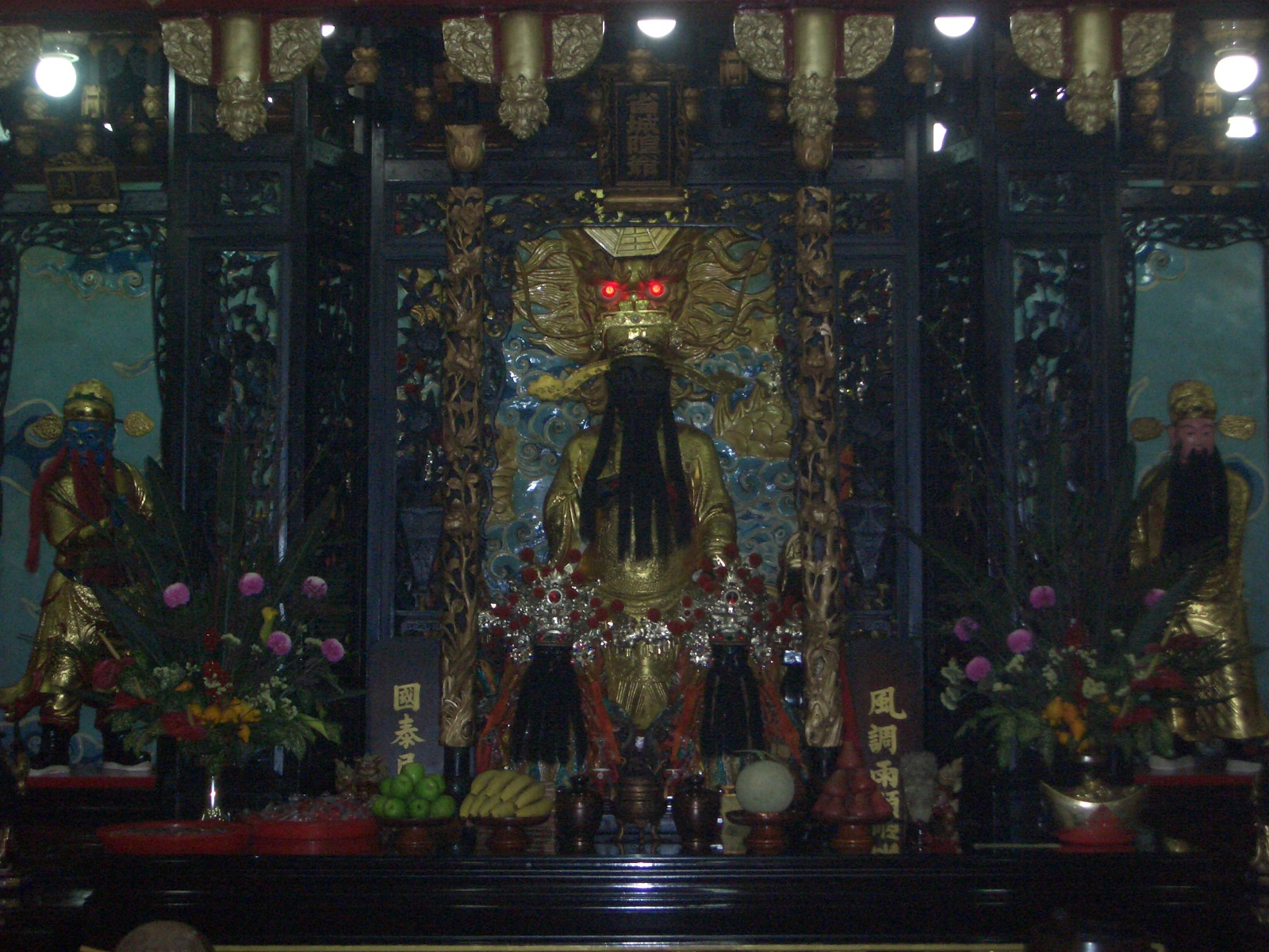 臺灣省城隍廟城隍雕像。